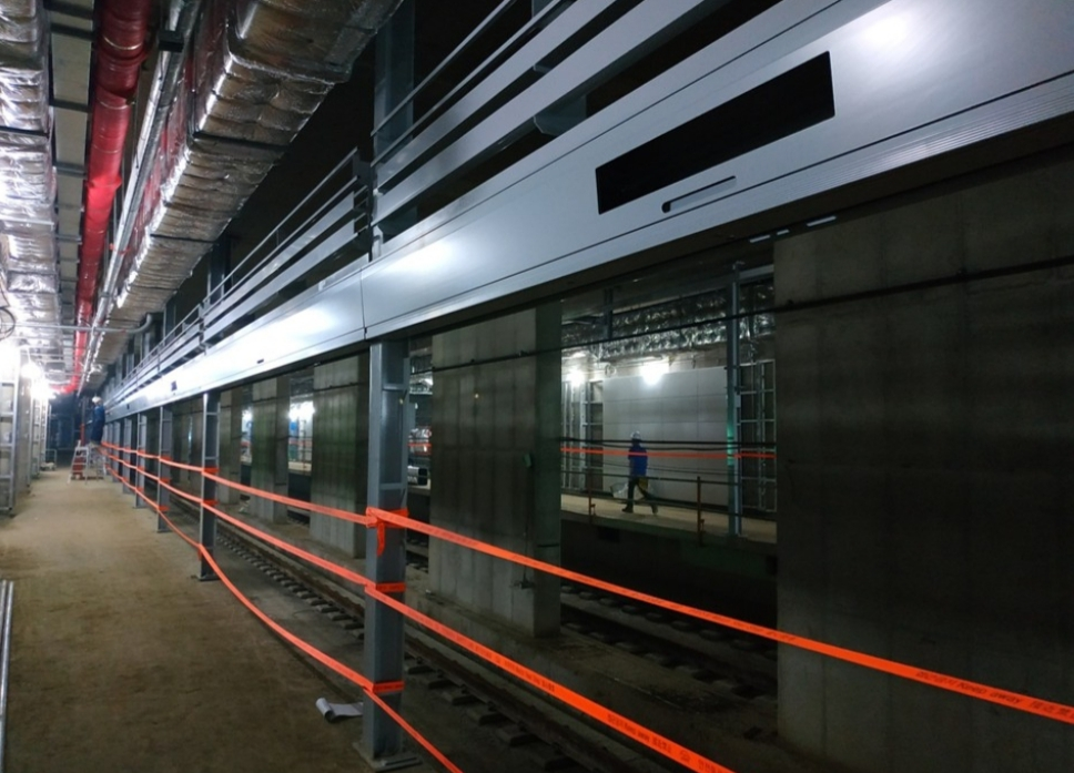 고색역 승강장